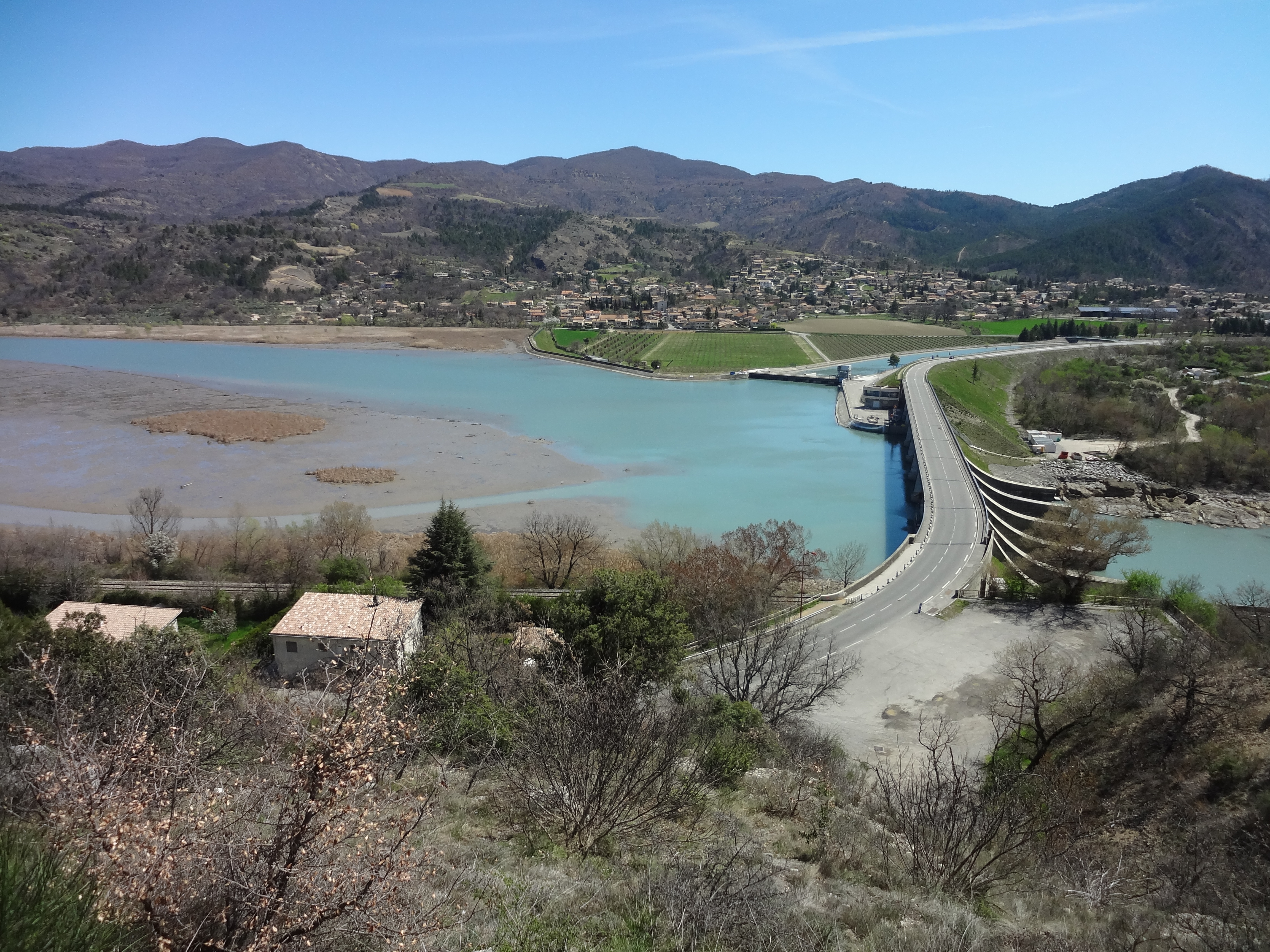 Vu du belvédère, proche de la station Total, à Saint-Auban